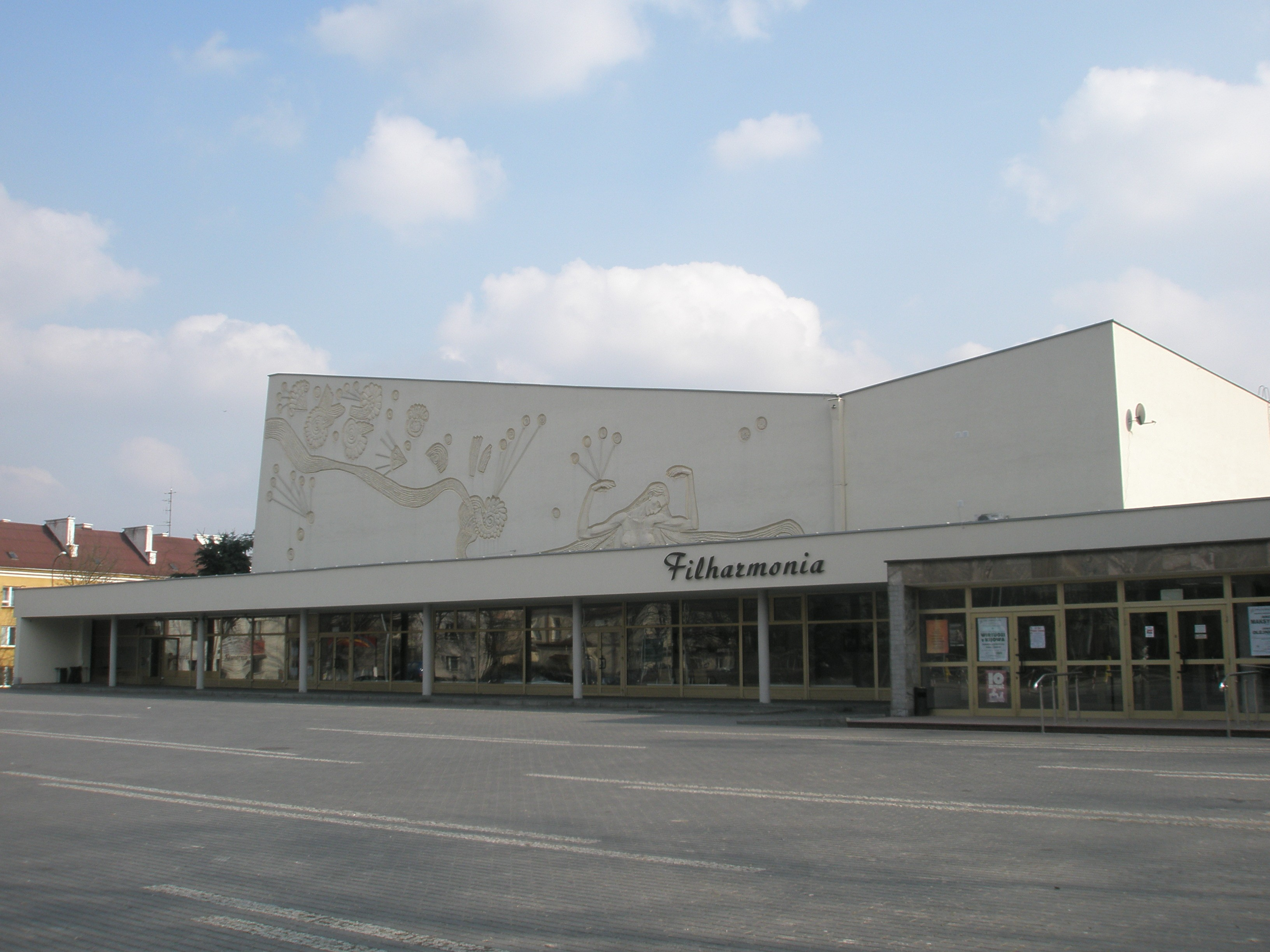 Budynek Filharmonii Podlaskiej na obrzeżach Parku Zwierzynieckiego